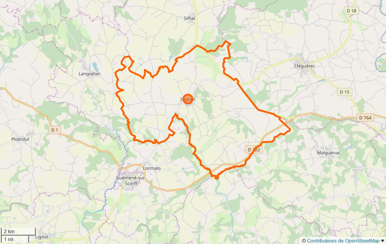 Cette carte a été créée à partir des données du projet Openstreetmap. This map may be incomplete, and may contain errors. Don't rely solely on it for navigation.